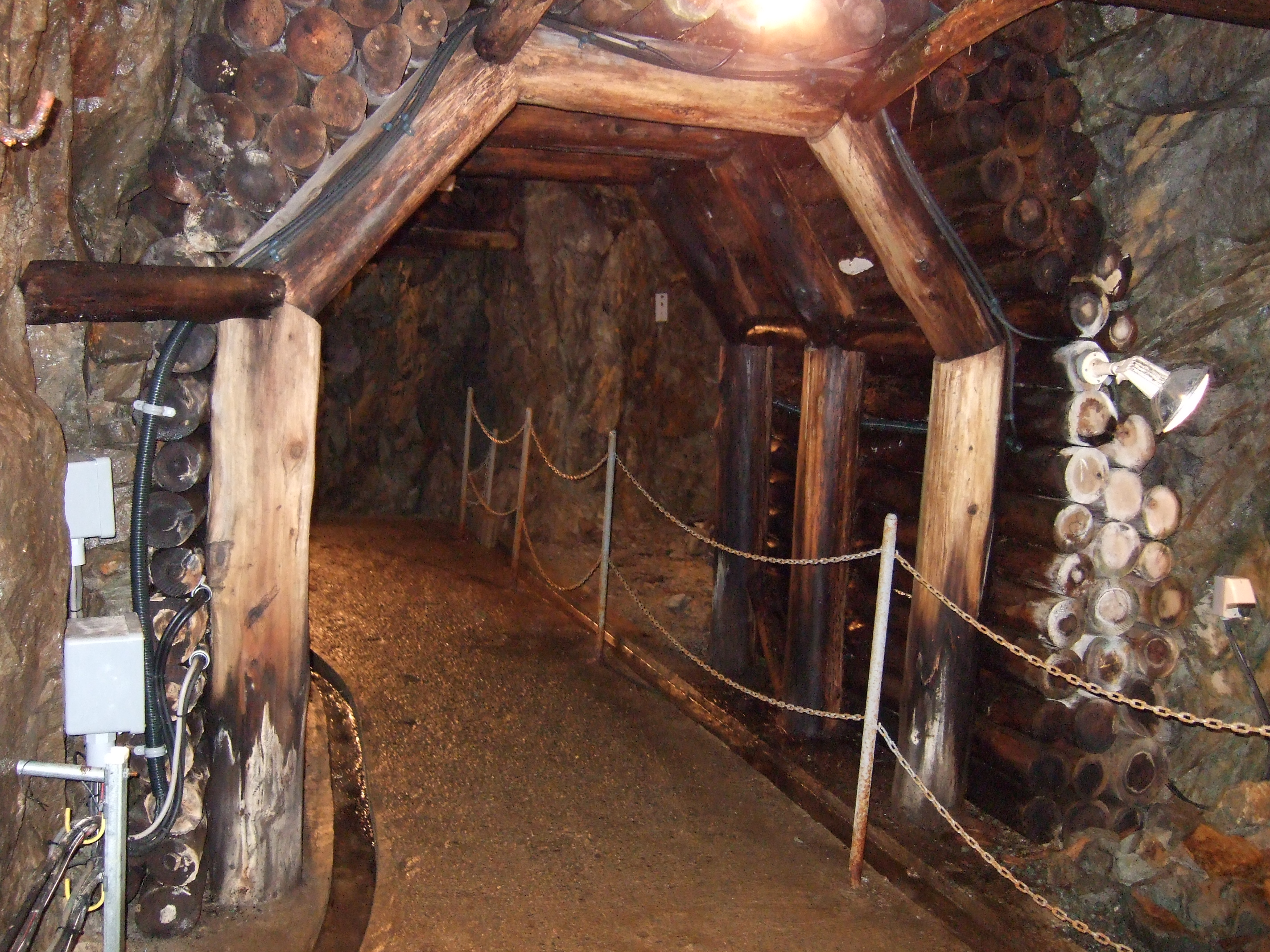 生野銀山